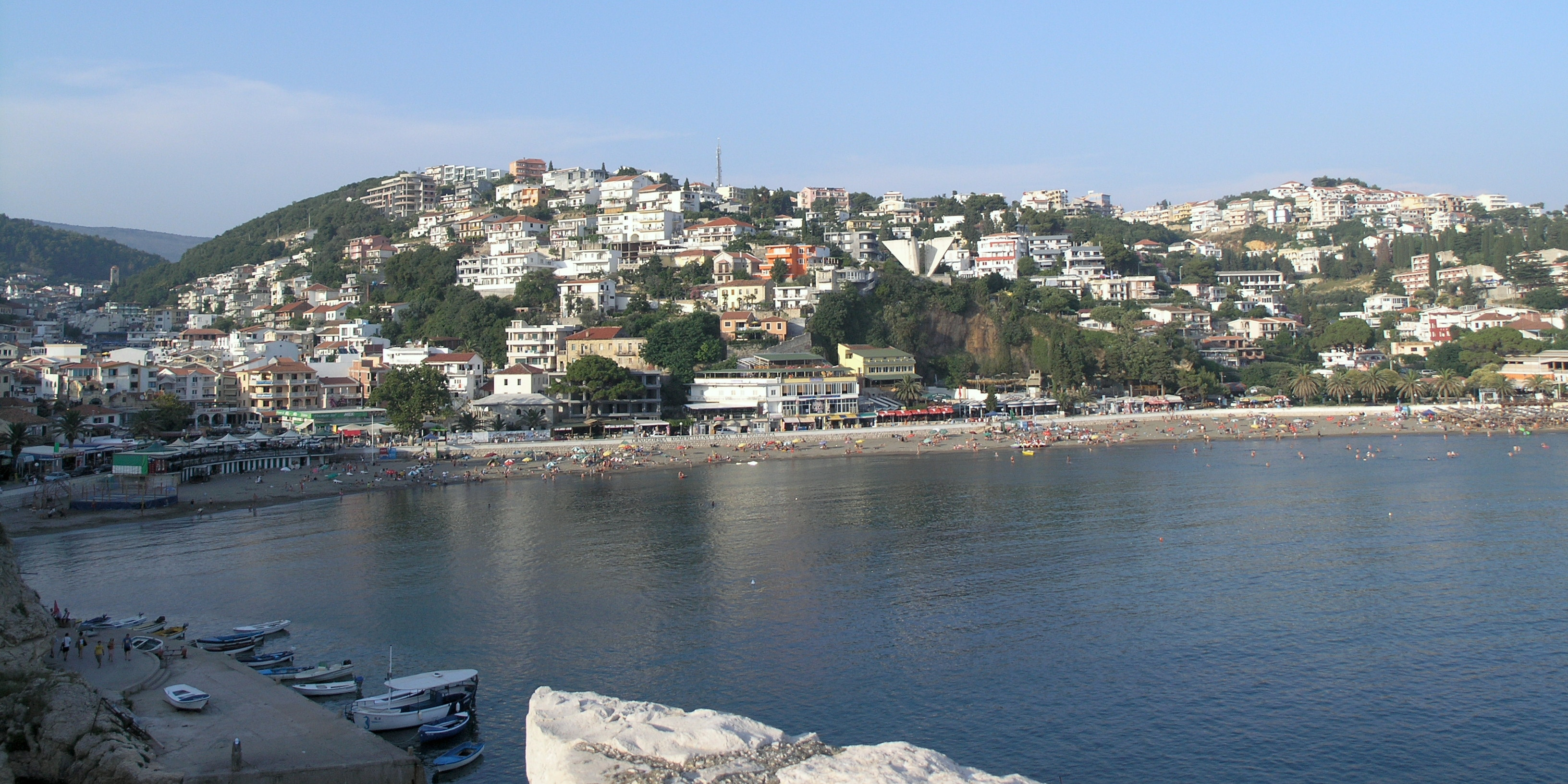 Černá Hora, Ulcinj - pohled na pláž a město z hradeb starého města